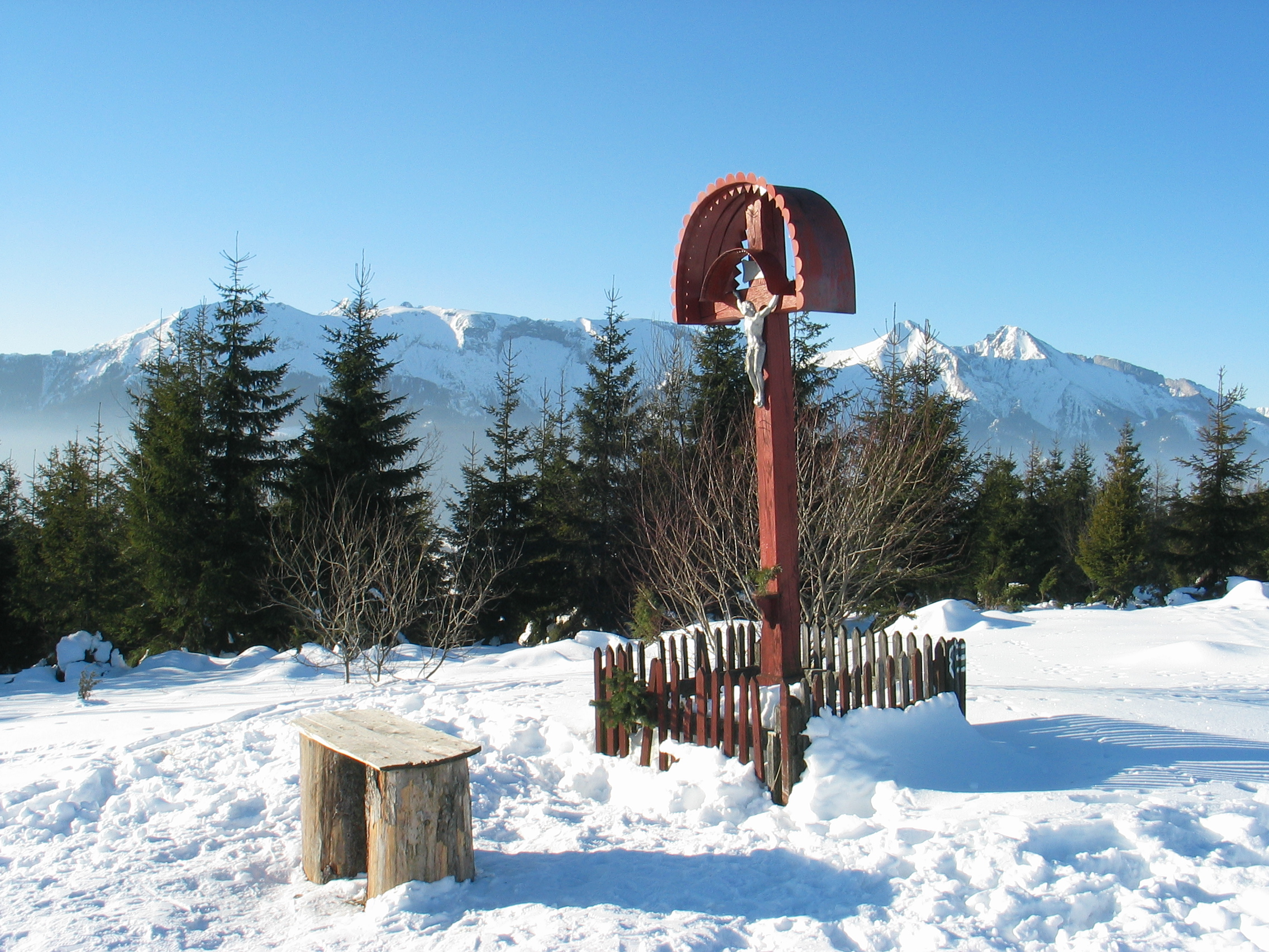 Gorska Kapliczka (Tatry) w tle Hawrań i Murań Shrine (Tatra Mountains)